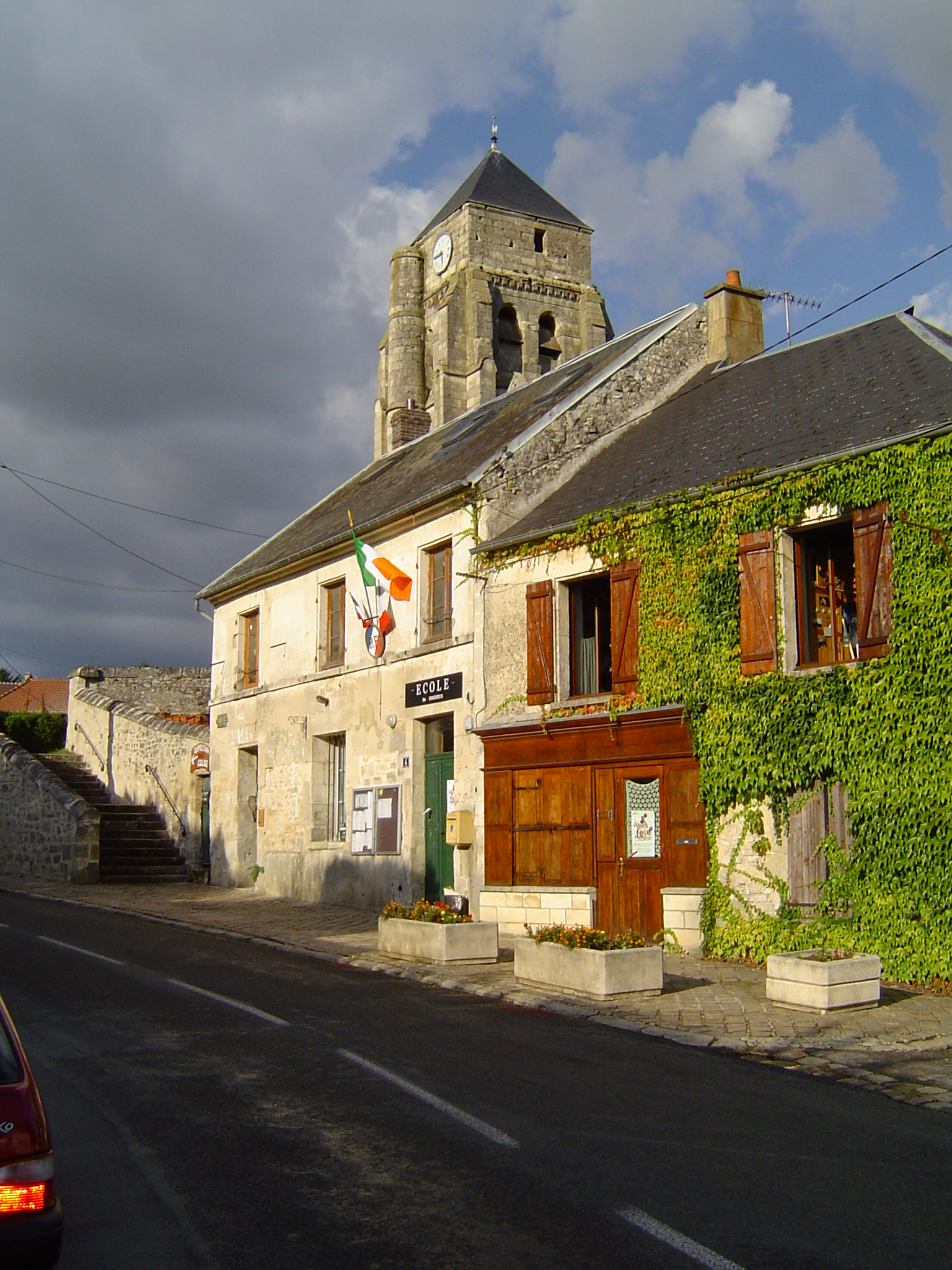 Vue de la mairie de Feigneux ainsi que de son remarquable clocher